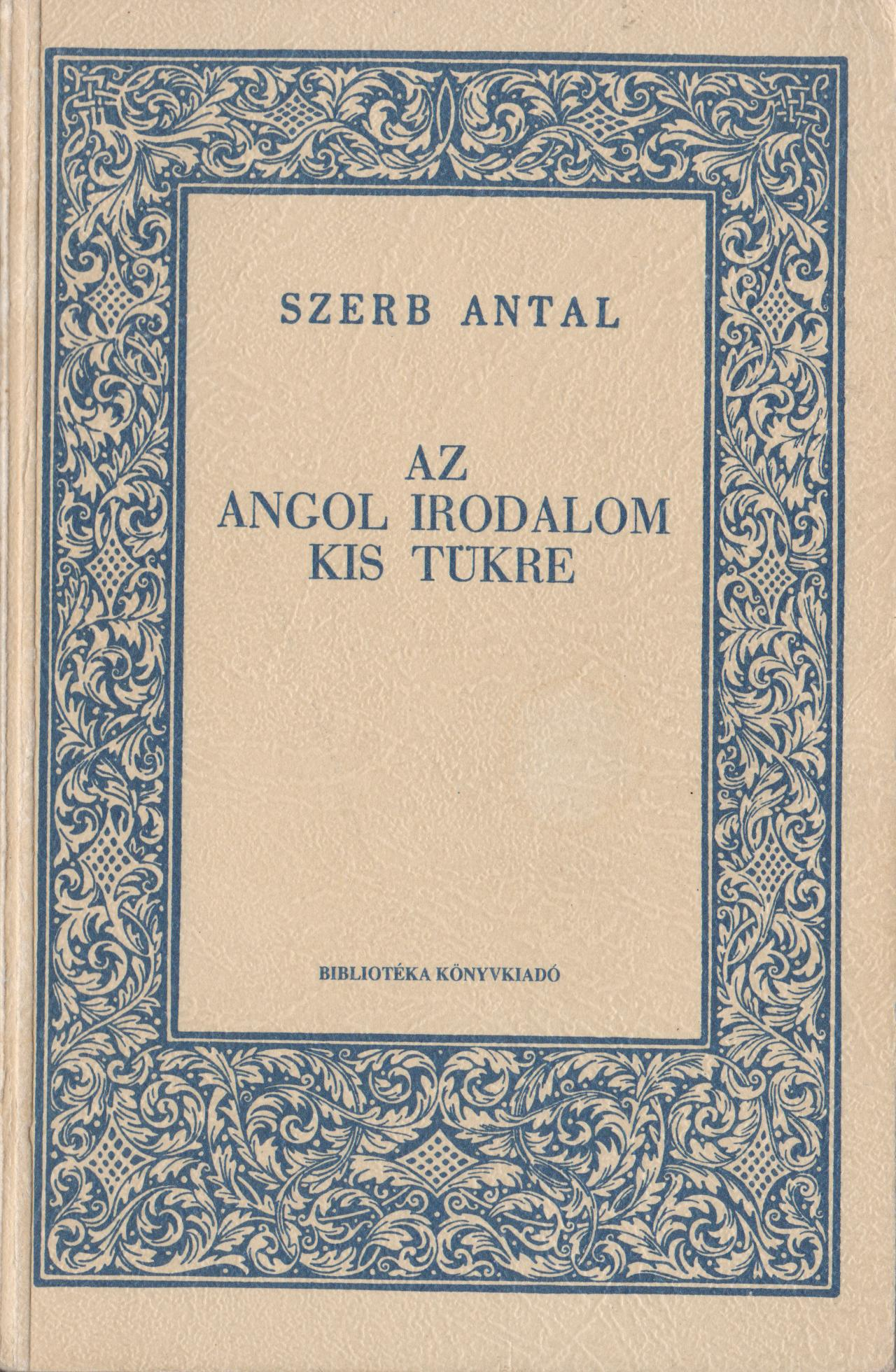 Az adott mű reprint kiadásának címlapja.